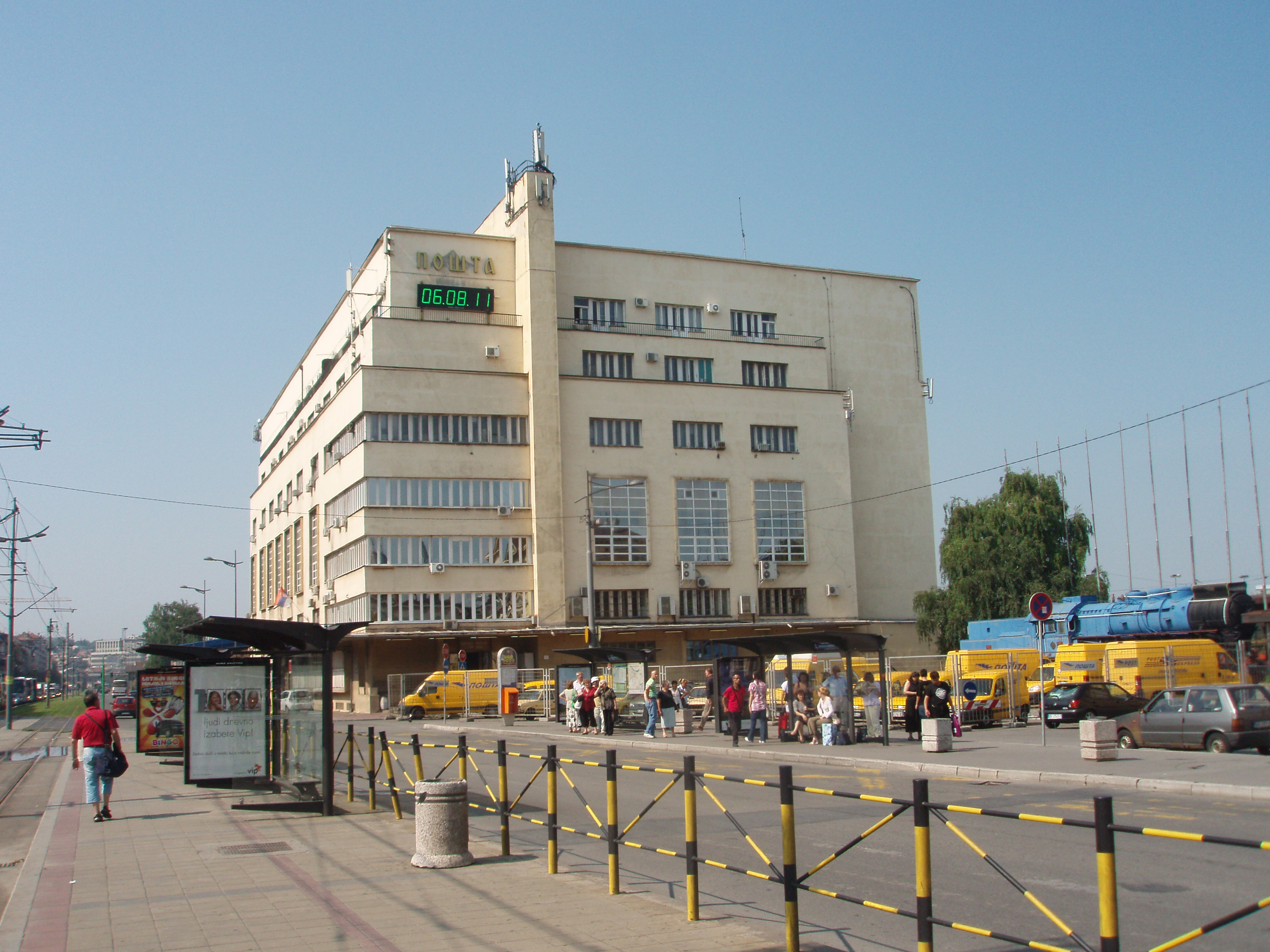 Pošta na Savskom trgu